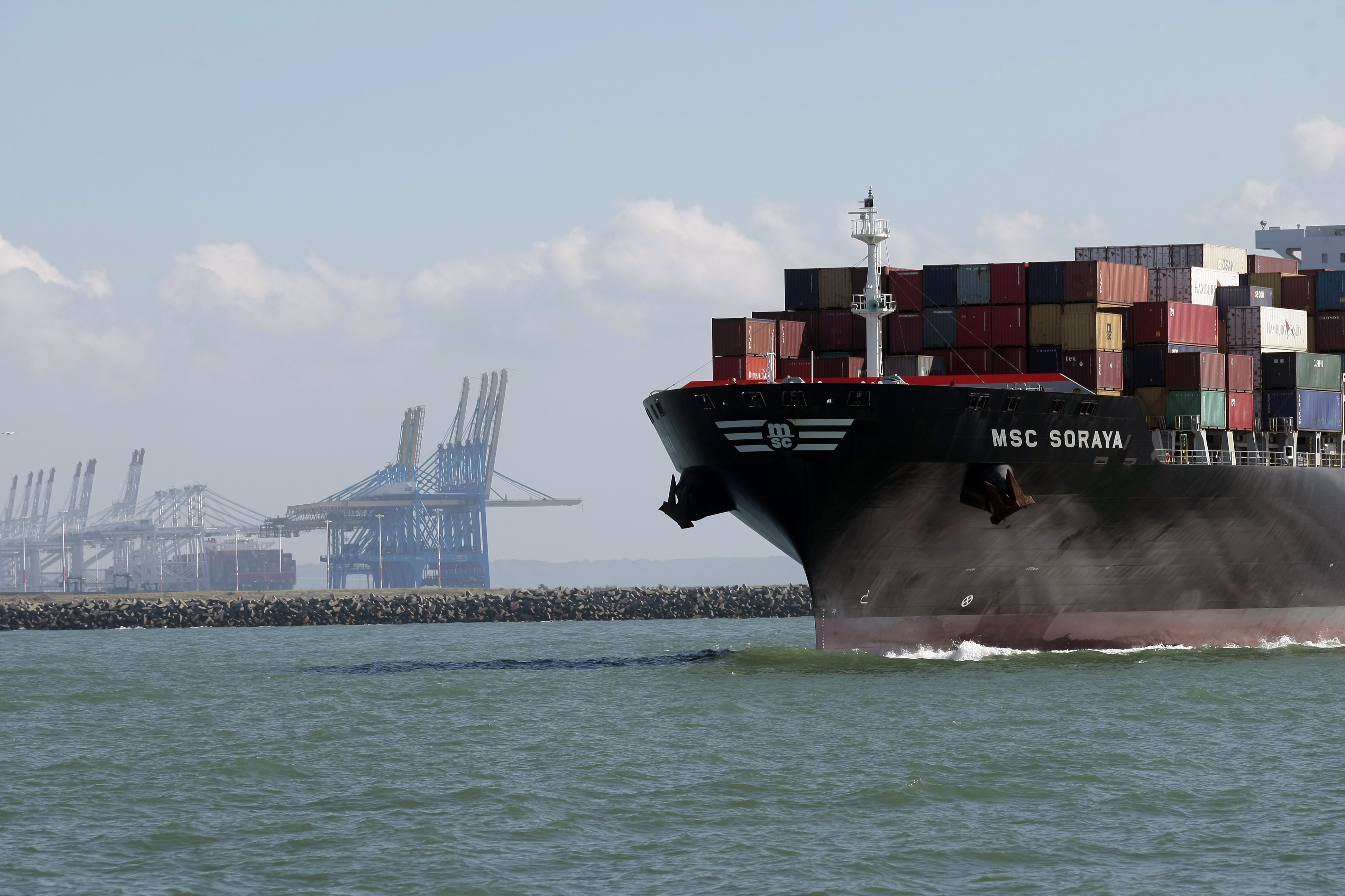 Le Havre, premier port de France pour le commerce extérieur